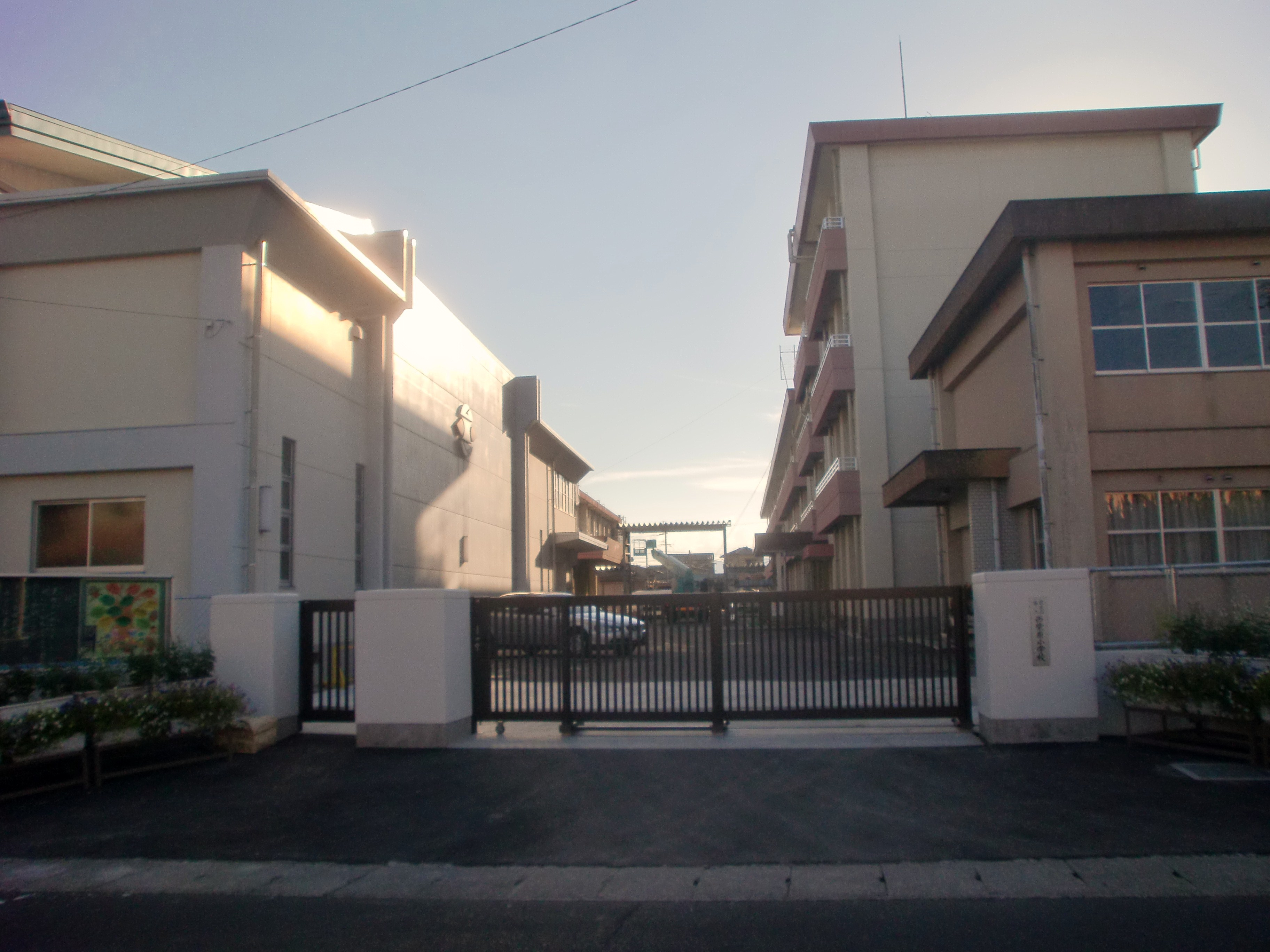 鹿児島市立西紫原小学校の外観。